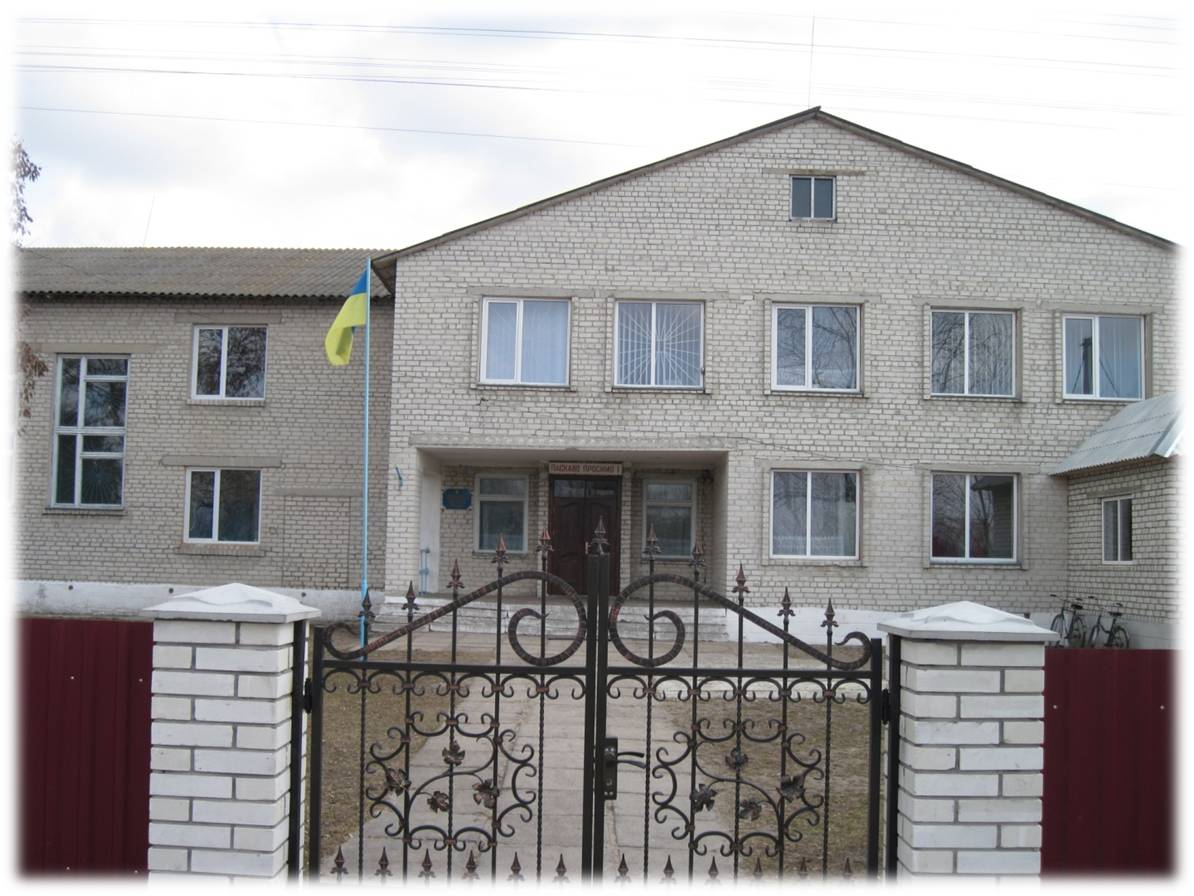 Навчально-виховний комплекс "Загальноосвітня школа І-ІІ ступеня - дитячий садок" с. Язавні